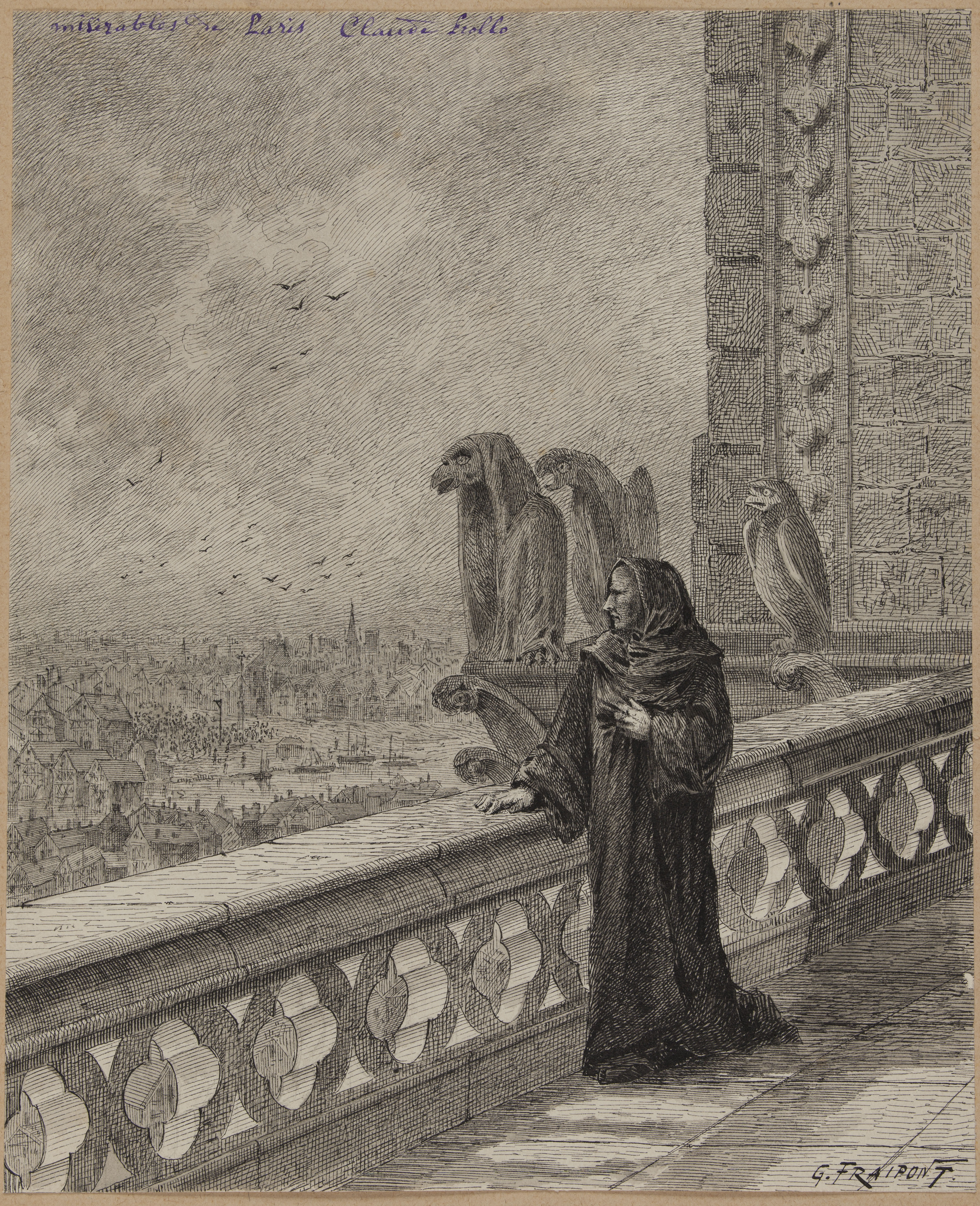 Claude Frollo, illustration de Gustave Fraipont pour Le livre d'or de Victor Hugo : par l'élite des artistes et des écrivains contemporains, Paris, H. Launette, 1883, [1].